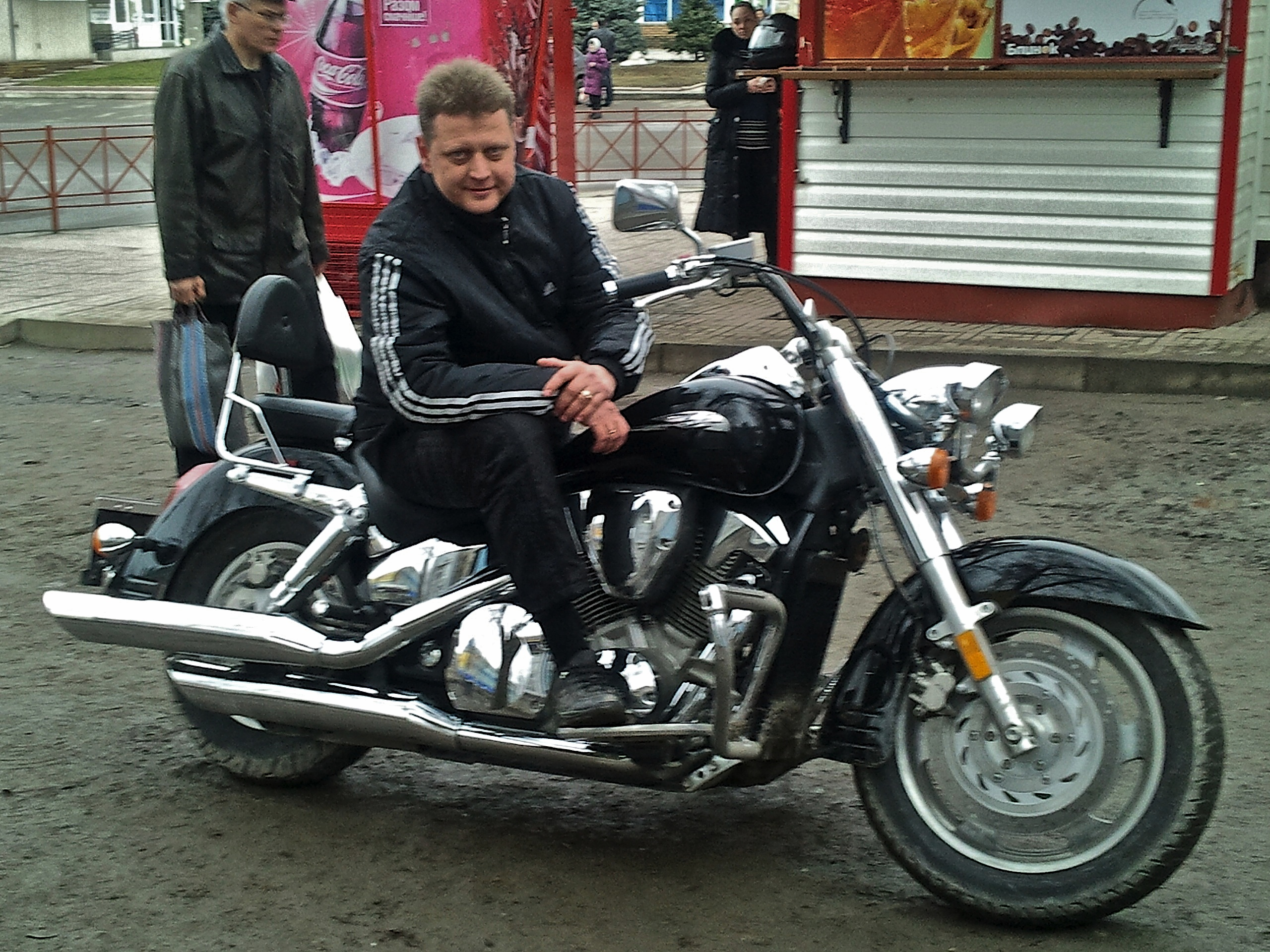 Мотоцикл Honda-VTX-1300R